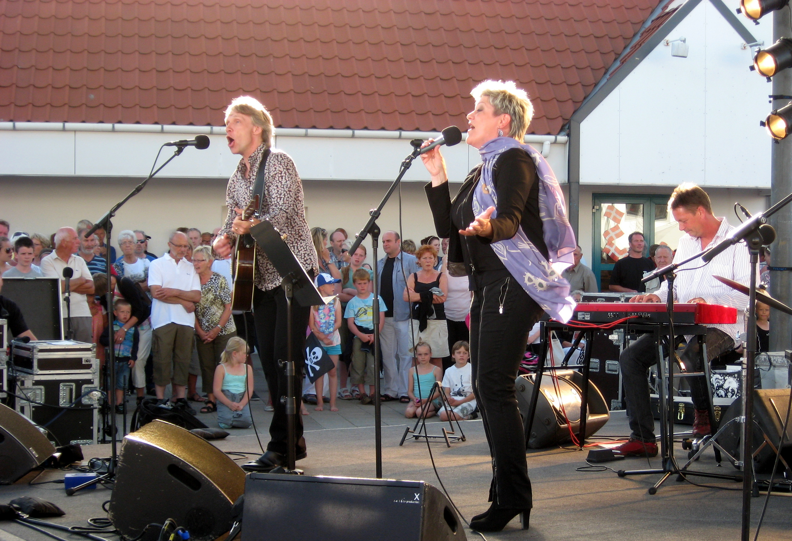 Ann-Mette Elten i Blokhus, 2011